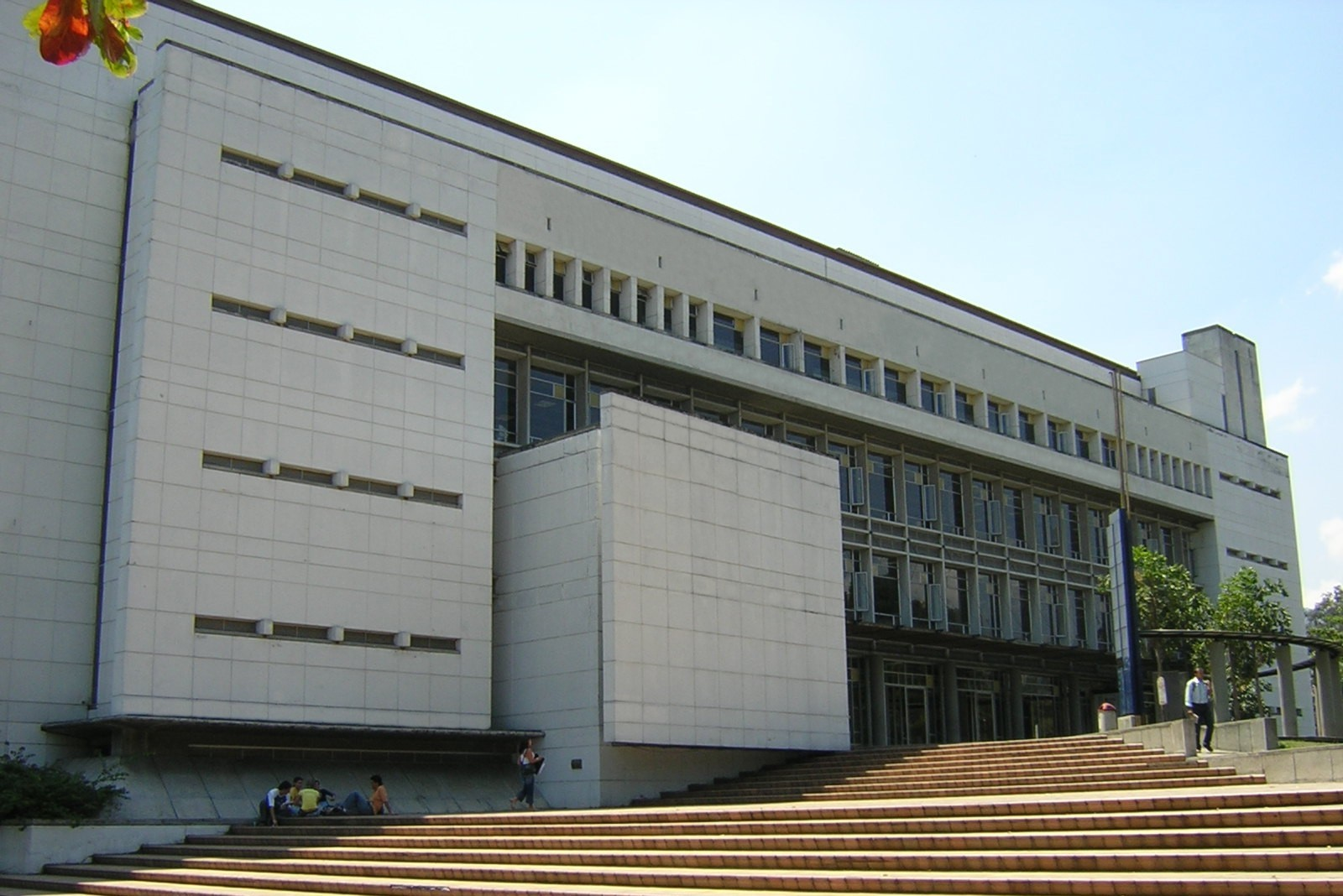 Biblioteca Central, Universidad Pontificia Bolivariana, Medellín, Colombia.